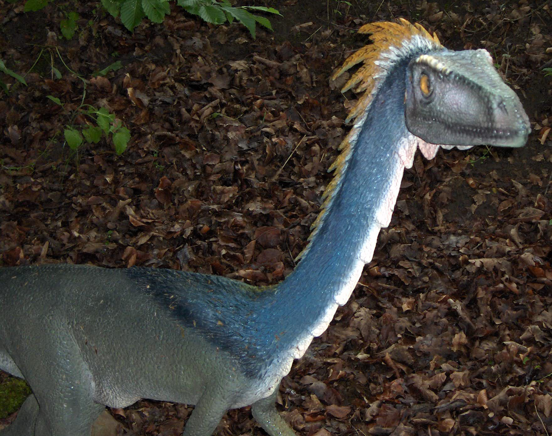 Modell eines Coelophysis im Dinosaurierpark Münchehagen